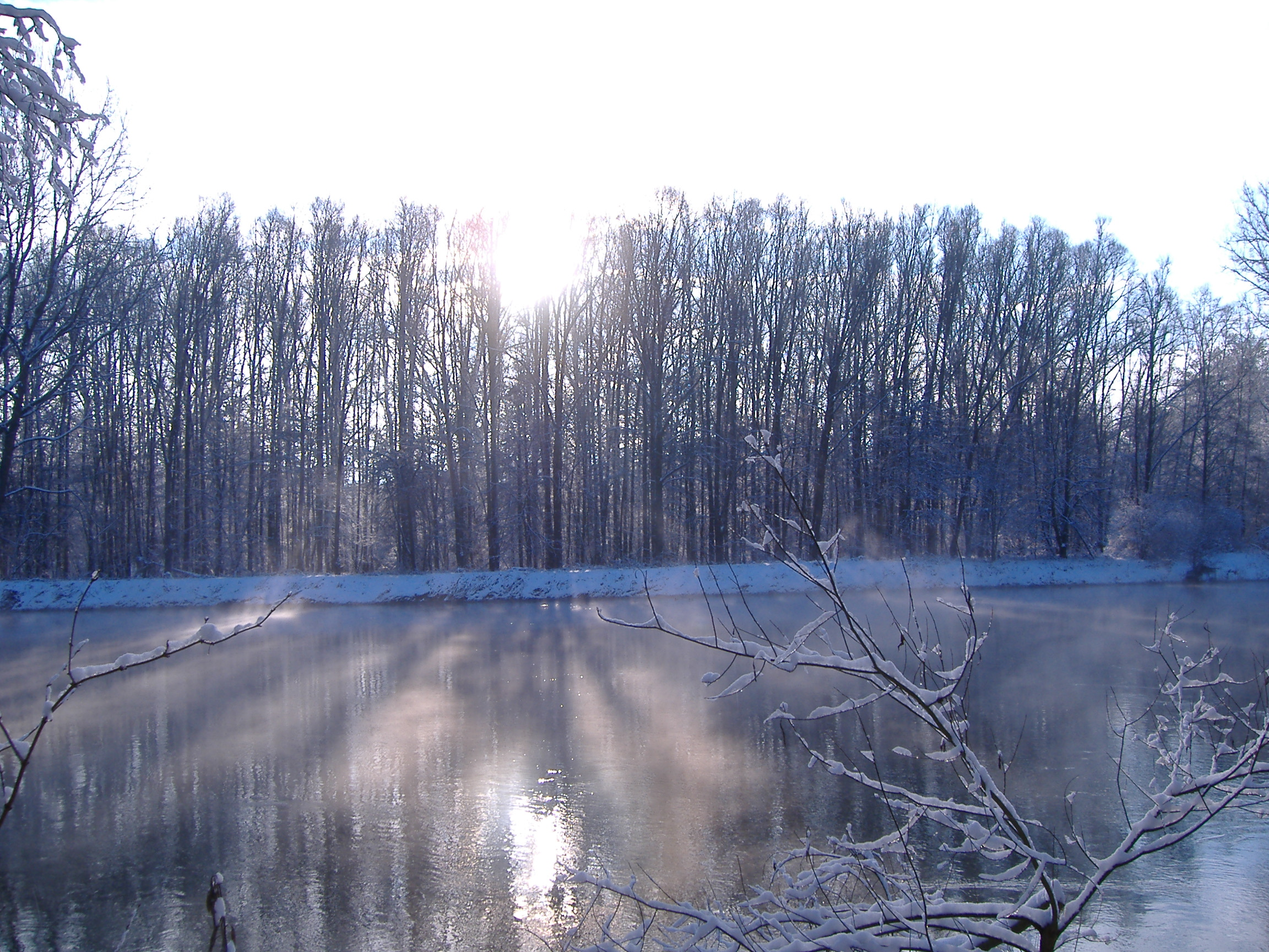 Donau im Winter